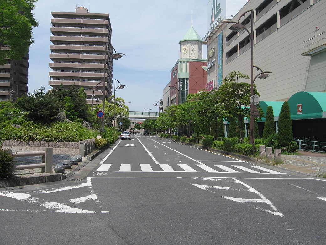 栗東駅東口風景